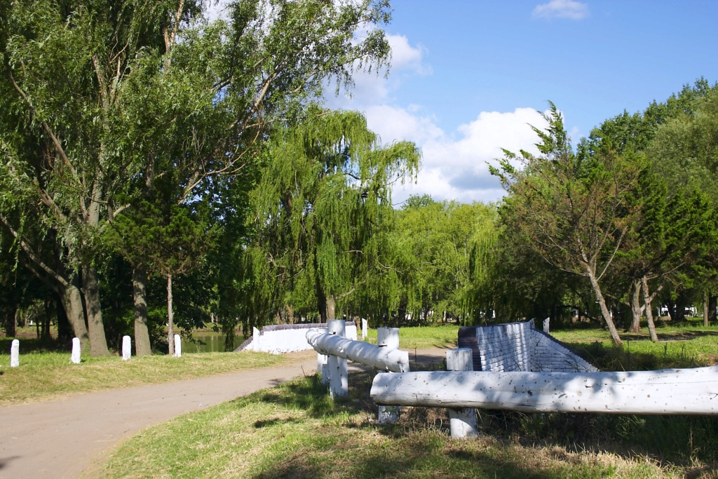 Parque municipal "17 de octubre", América, Rivadavia, Buenos Aires, Argentina